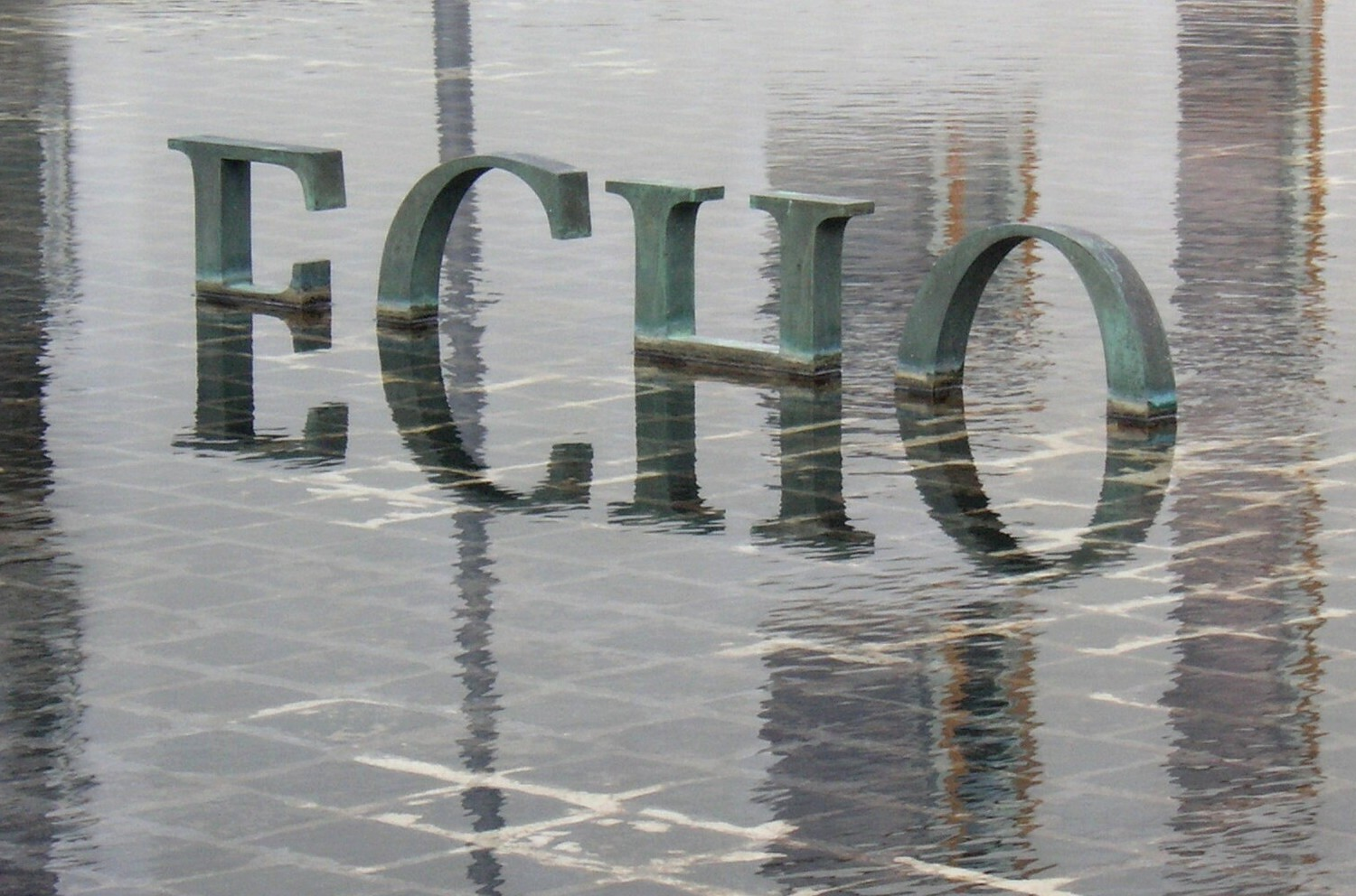 Fredrik Wretman "ECHO" vid Södersjukhuset i Stockholm